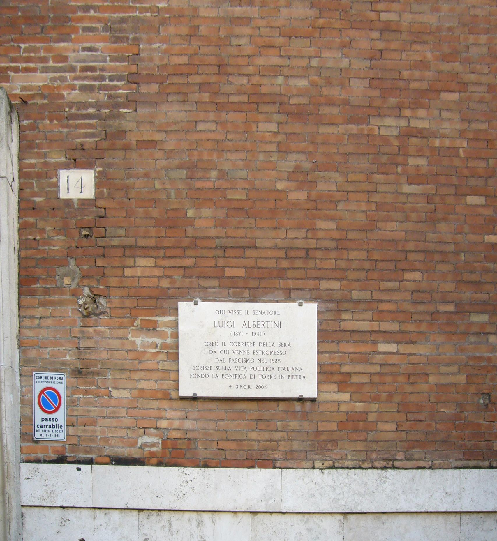 Roma, via XXIV Maggio 14. Memoria del senatore Albertini all'ingresso del palazzo Mengarini dove abitò.